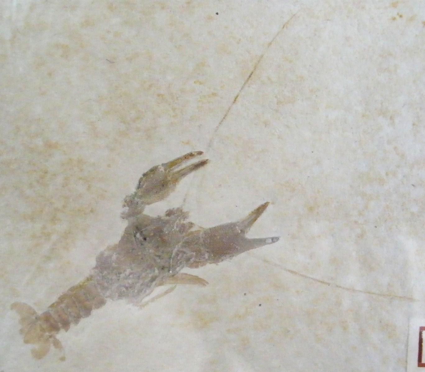 Fossil of Eryma modestiformis, an extinct crustacean - Took the photo at Teylers Museum, Haarlem